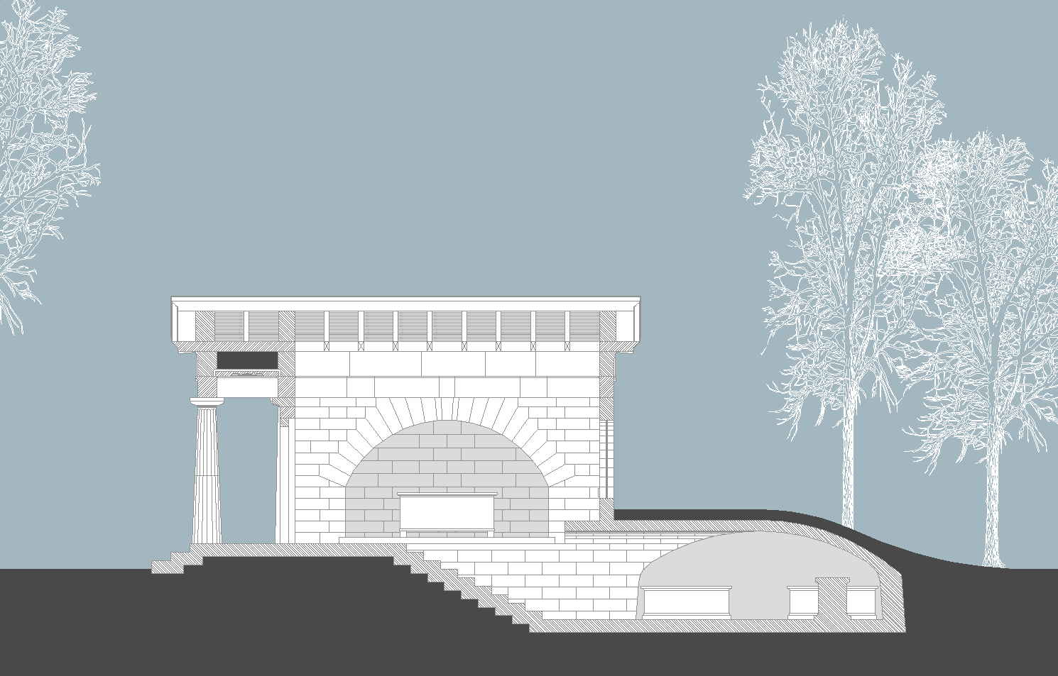 Mausoleum der Familie von Hoym, Schnitt C. © Eiko Behrens